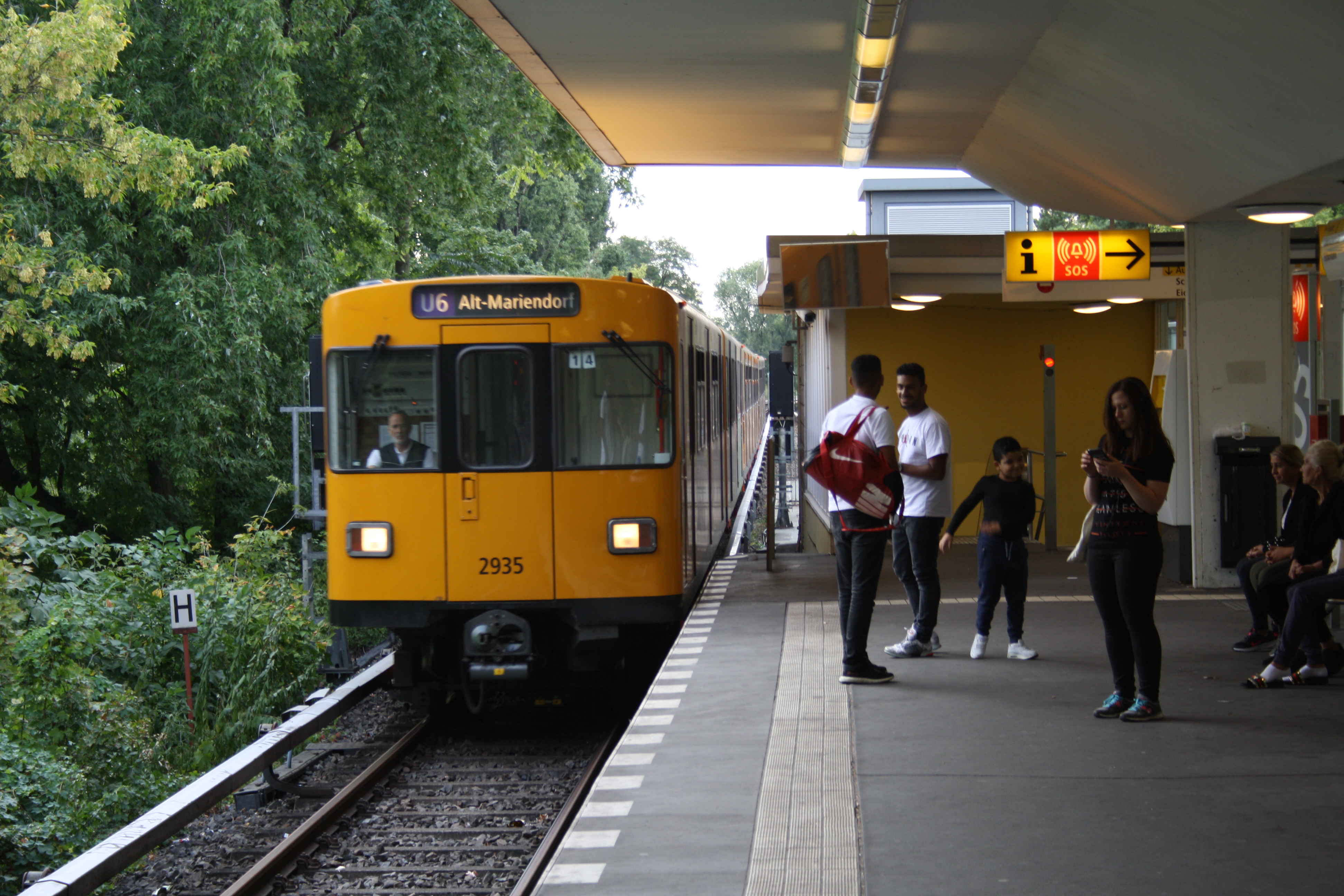 U-Bhf. Scharnweberstraße Berlin